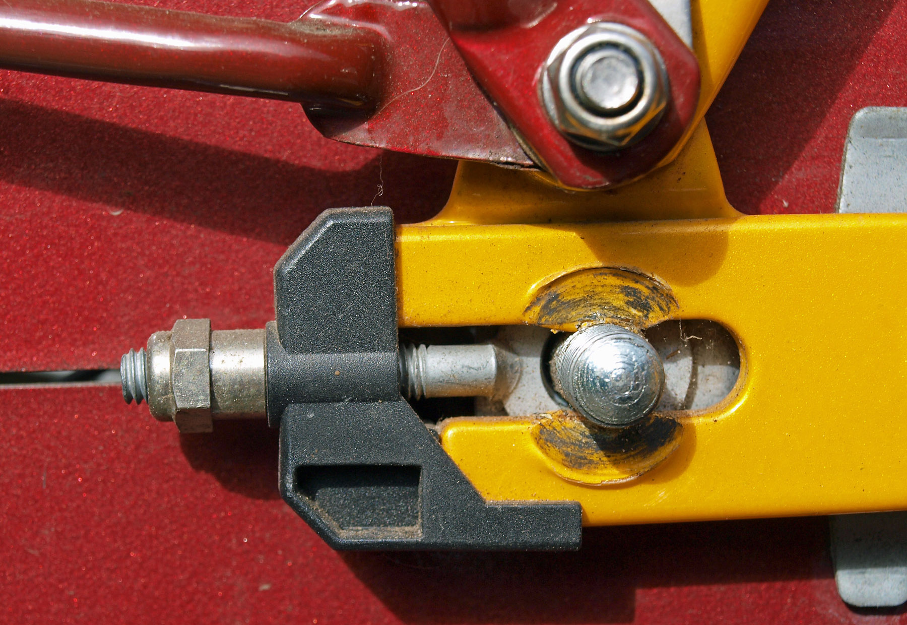 kettingspanner rechts bij achterwiel fiets